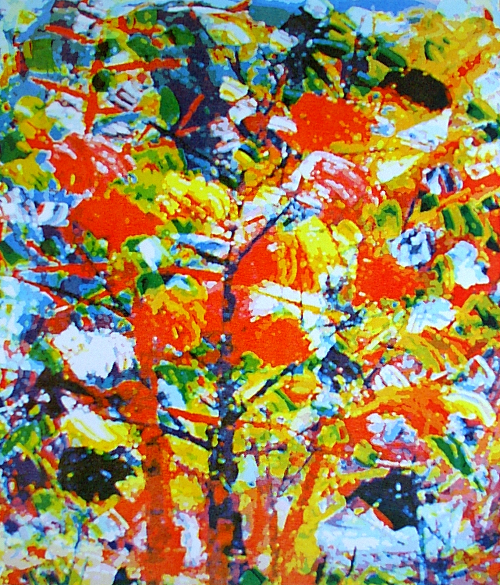 Wildes, Holzschnitt von Joachim Feldmeier, 2008, Auflage 5, Papierformat 89 x 79 cm, Plattenformat 67,8 x 57,8 cm, Hahnemühle Alt Jülich 300 g, Drucker Feldmeier